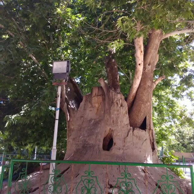 تفرجگاه قدمگاه محمد حنفیه